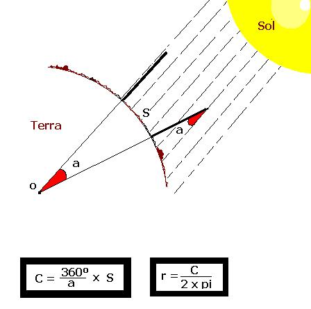 Método pelo qual Eratostenes calculou o comprimento da circunferência da Terra.